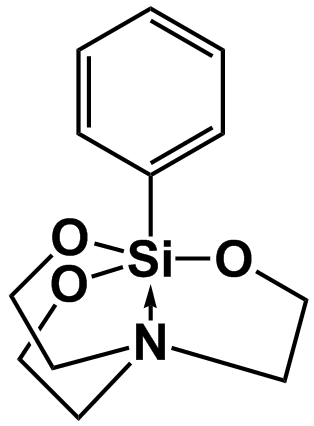 Fenylsilatrán, syntetické konvulzívum.